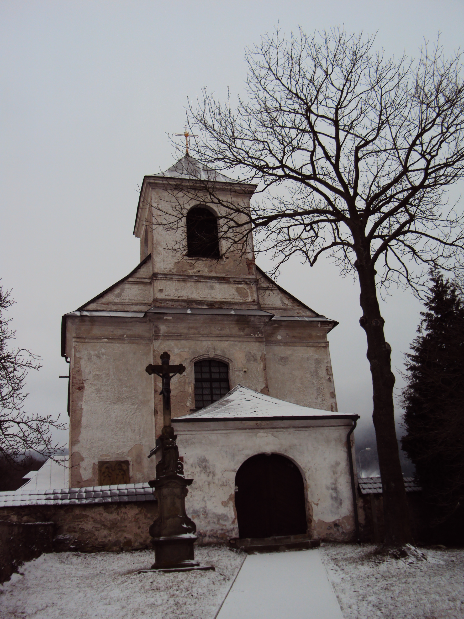 Mlýnický Dvůr Křížek